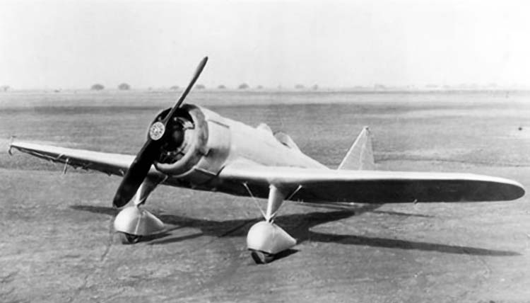 Это - IAR 15.